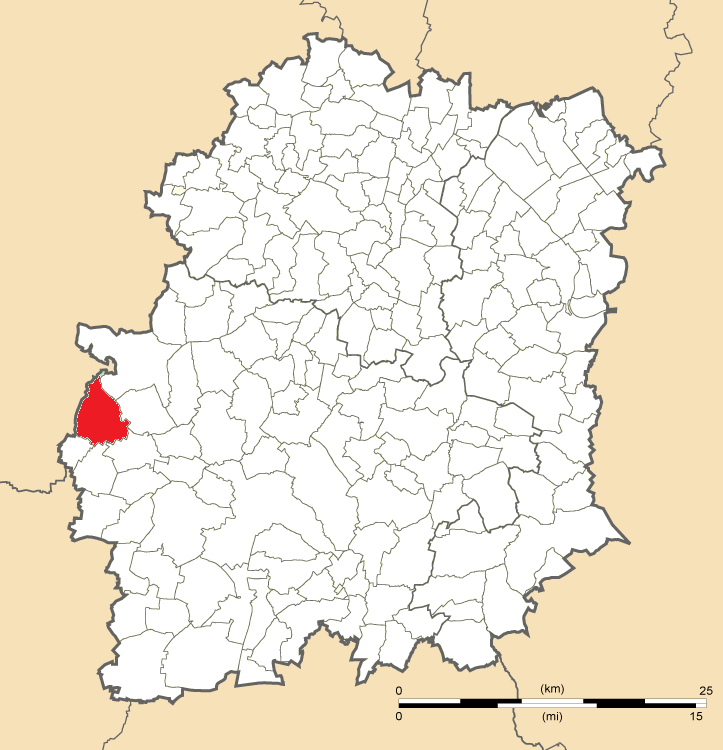 Carte de position de Corbreuse en Essonne (91)